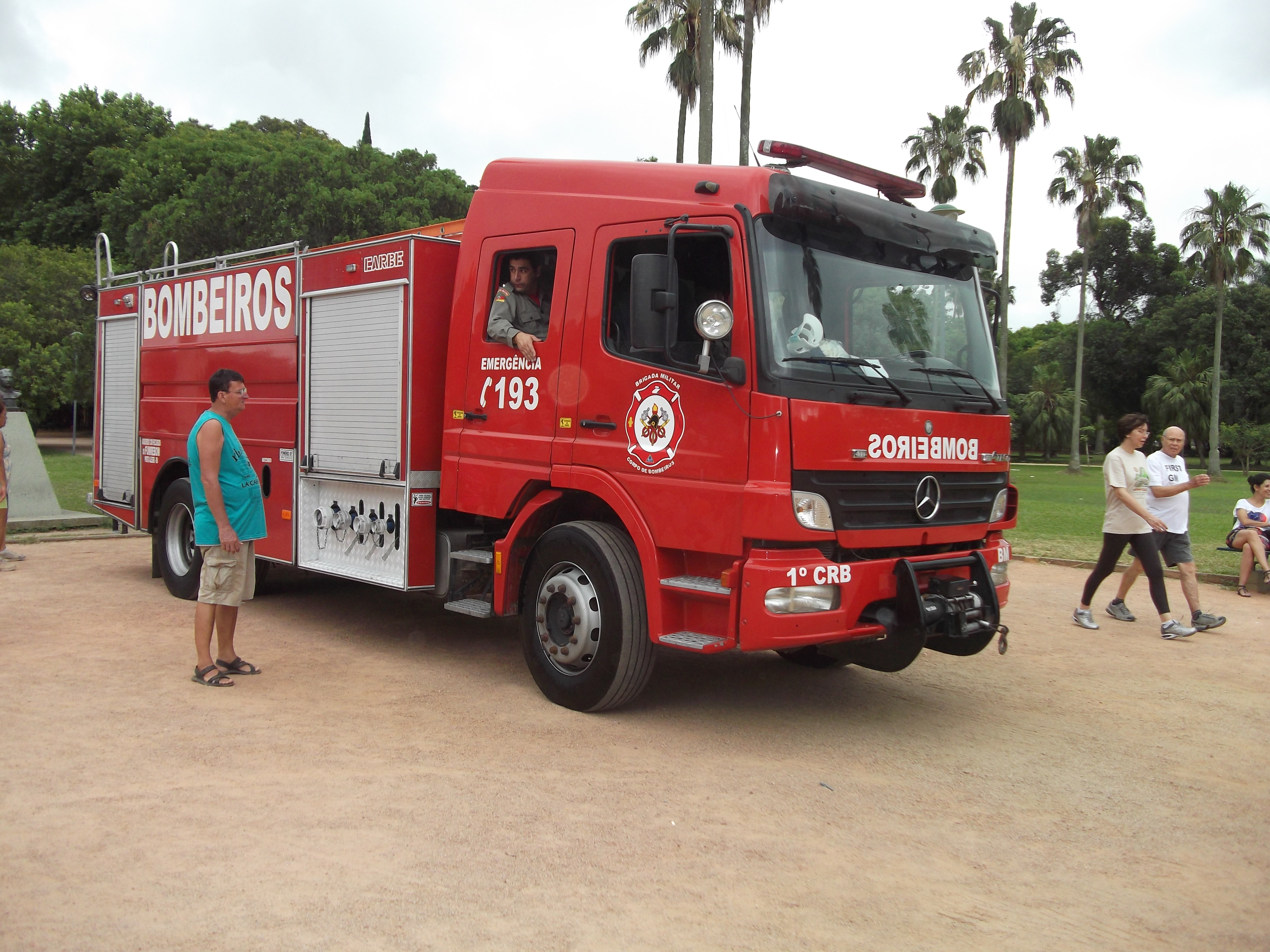 Corpo de Bombeiros Brigada Militar do Rio Grande do Sul